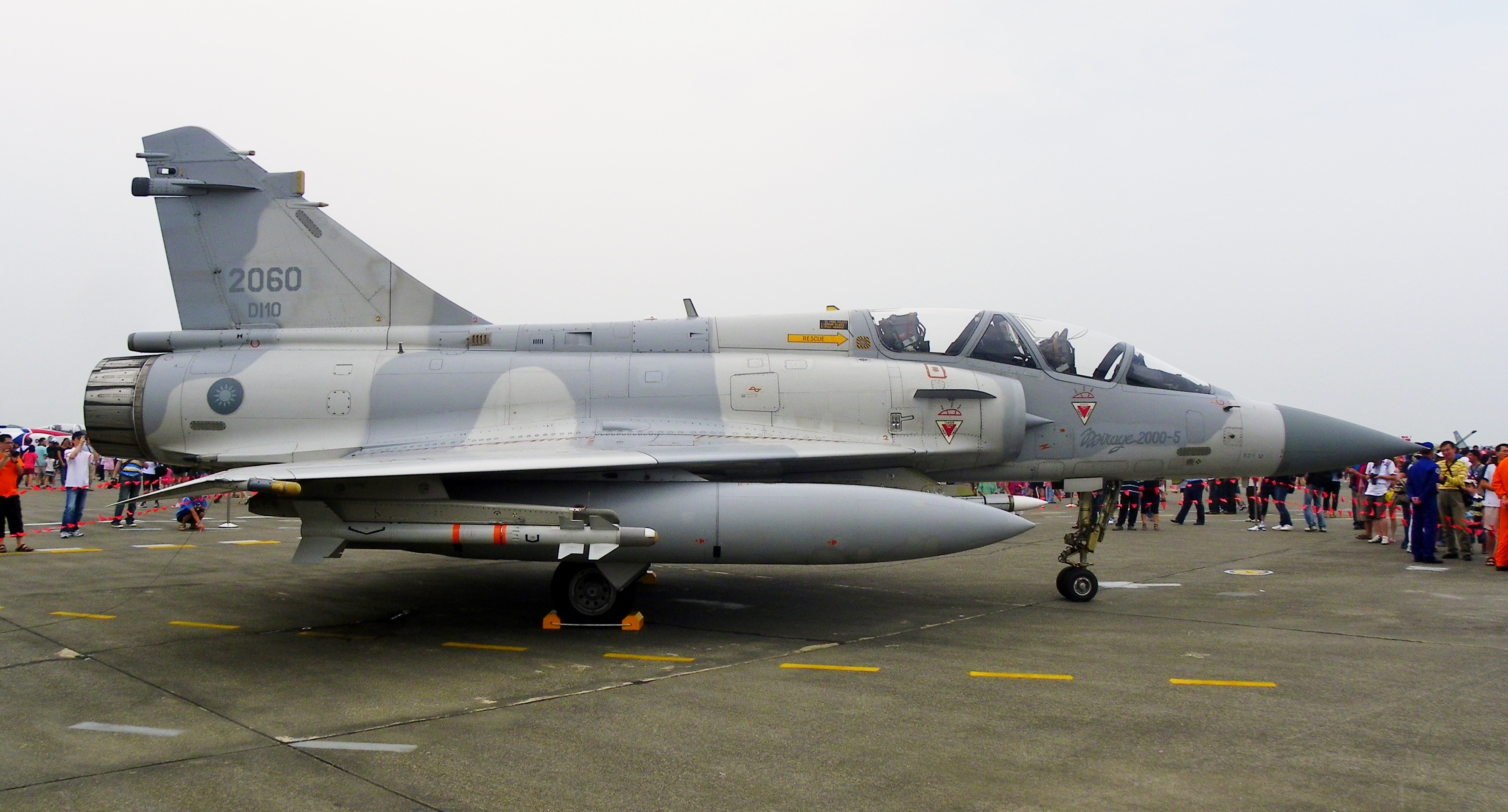 幻象2000戰鬥機複座型側視，攝於2011年空軍岡山基地營區開放活動。